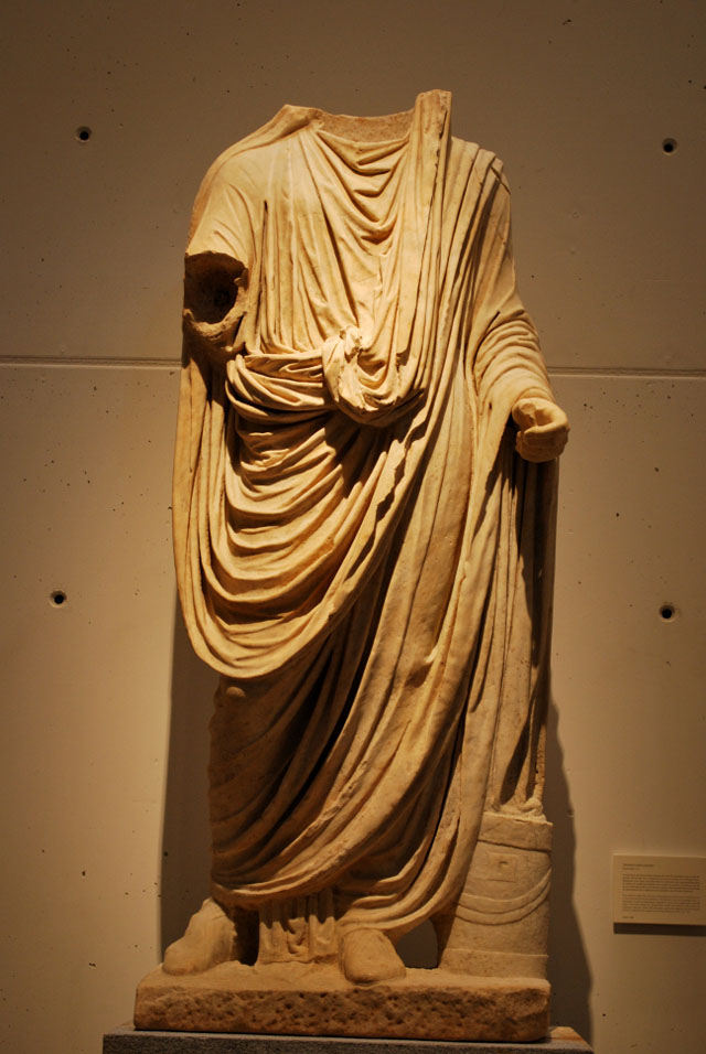 Escultura de un togado romano, posiblemente Augusto en el Museo del Teatro Romano de Cartagena. Procede de la curia romana de Carthago Nova.